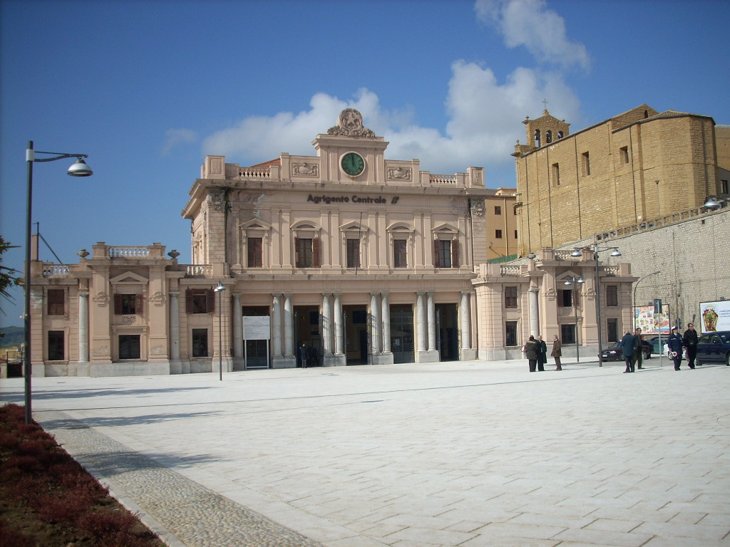 Piazza Stazione and Central Railway Station in Agrigento